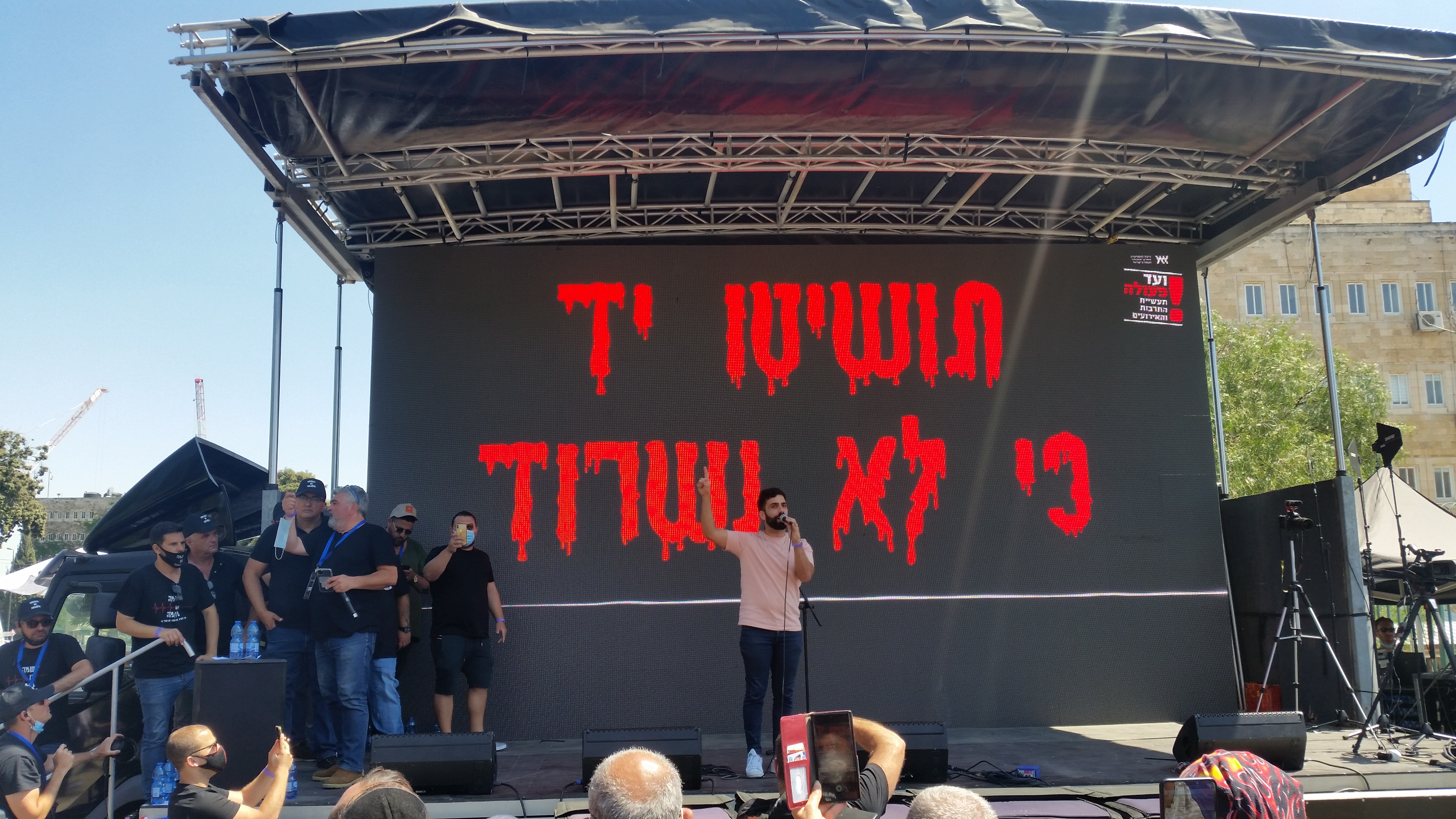 הפגנת תעשיית התרבות בירושלים